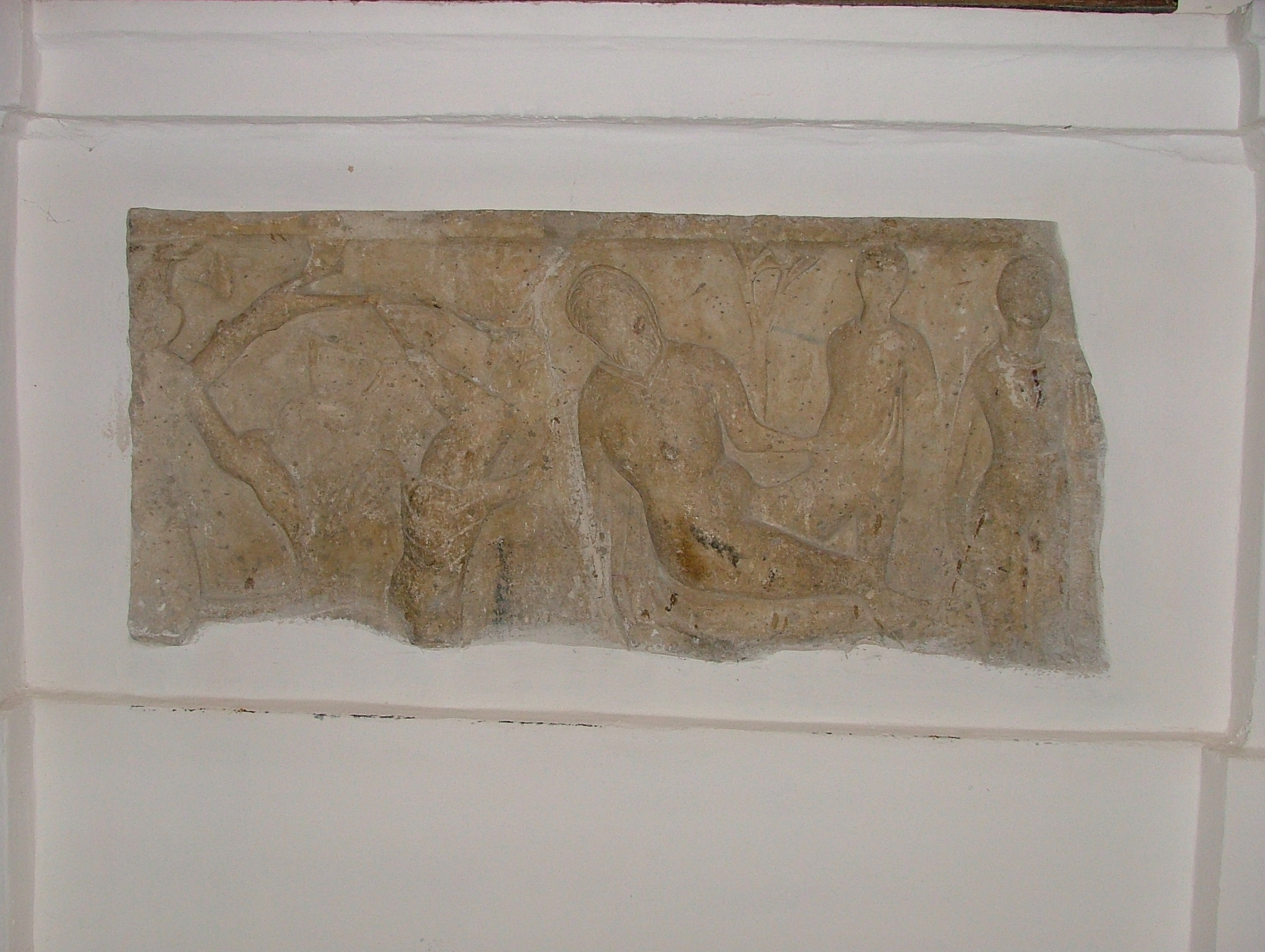 Frammento di sarcofago istoriato del III sec. d. C. posto a decorare una parete della cattedrale di Santa maria Assunta, Autore: Rocco Stasi Fonte: fatta da me, sono l'autore. Licenza: GFDL, sono l'autore